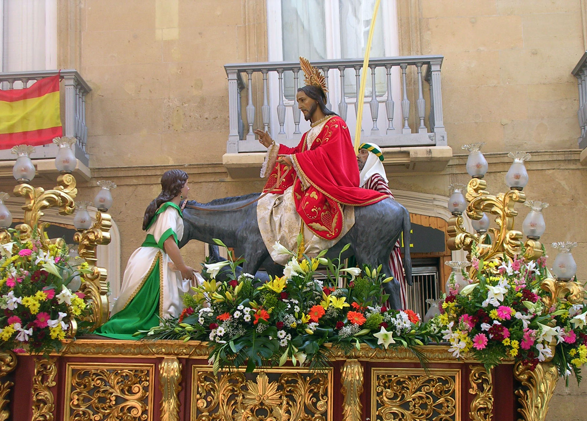 Procesión del Domingo de Ramos (Californios, Cartagena)